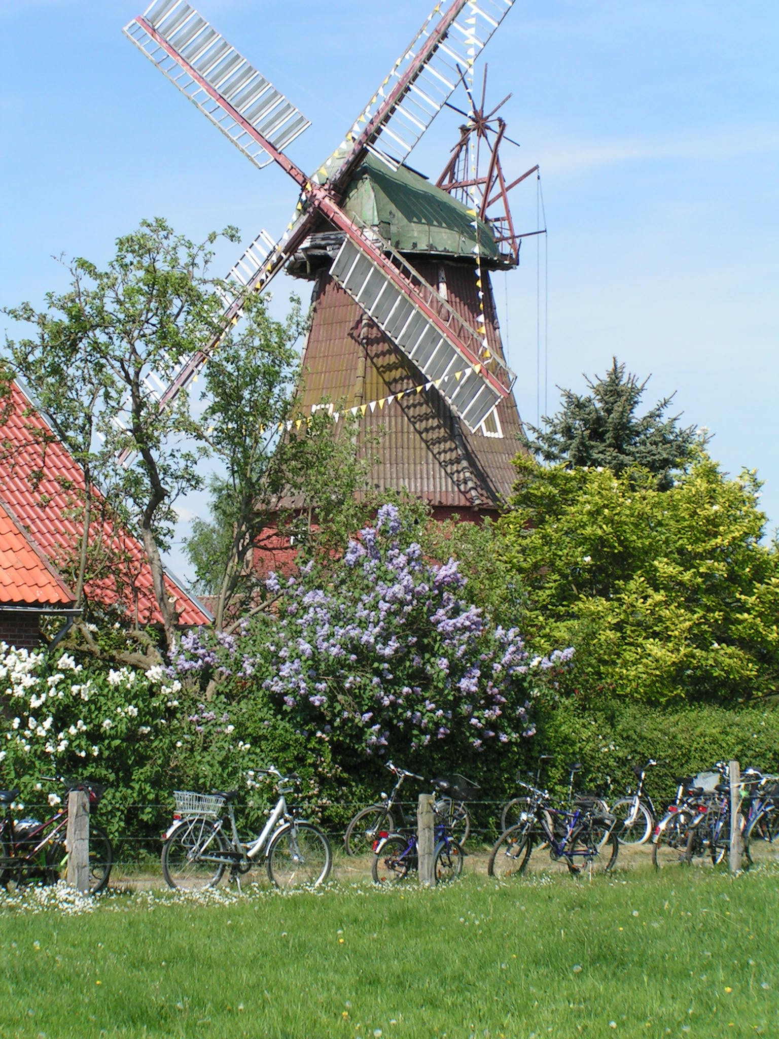 Windmühle Labbus in Sulingen